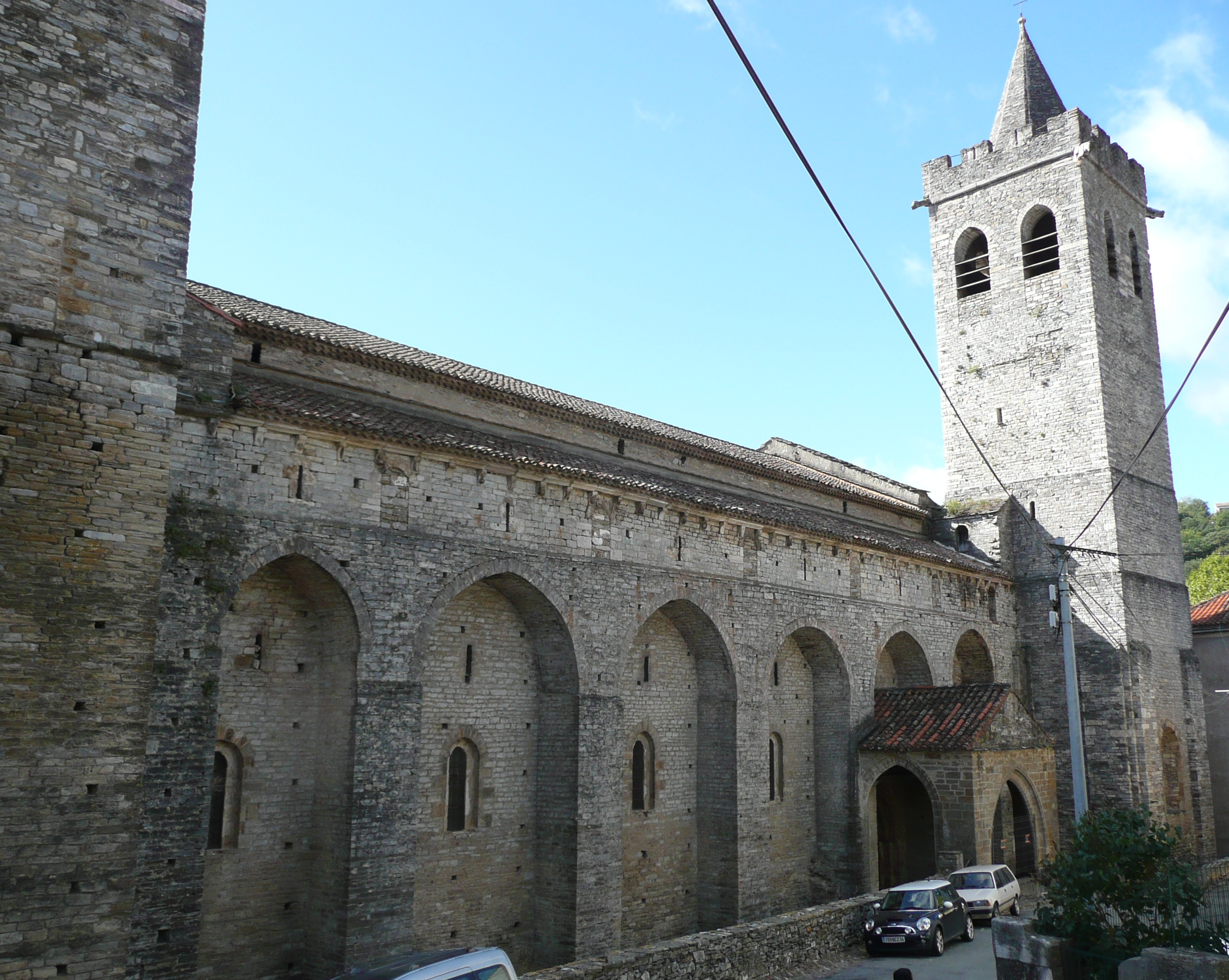 Façade nord 12e S. entre les deux tours subsistant de l'enceinte du XIIIe.